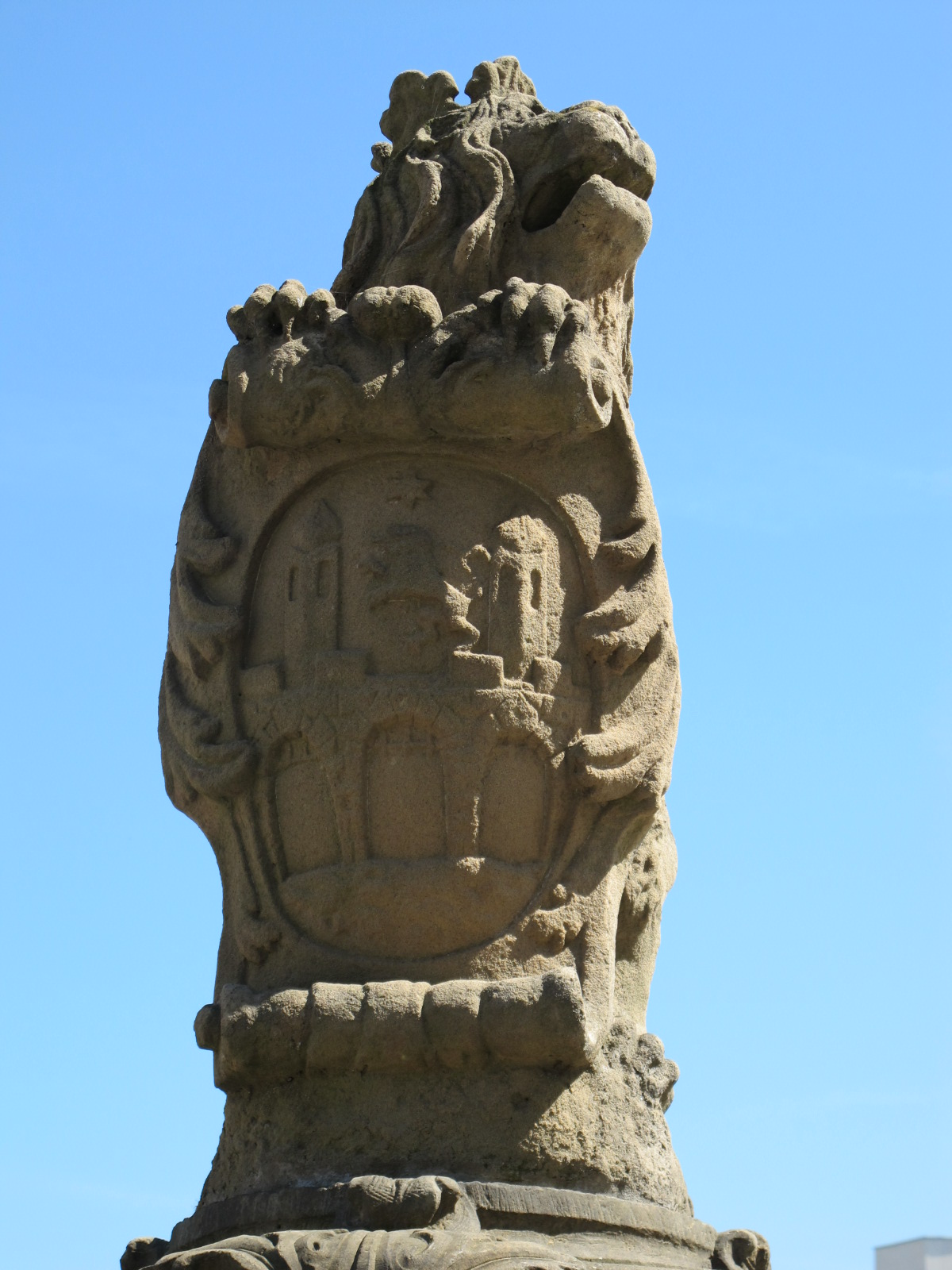 Znak města Mostu na kašně na 1. náměstí